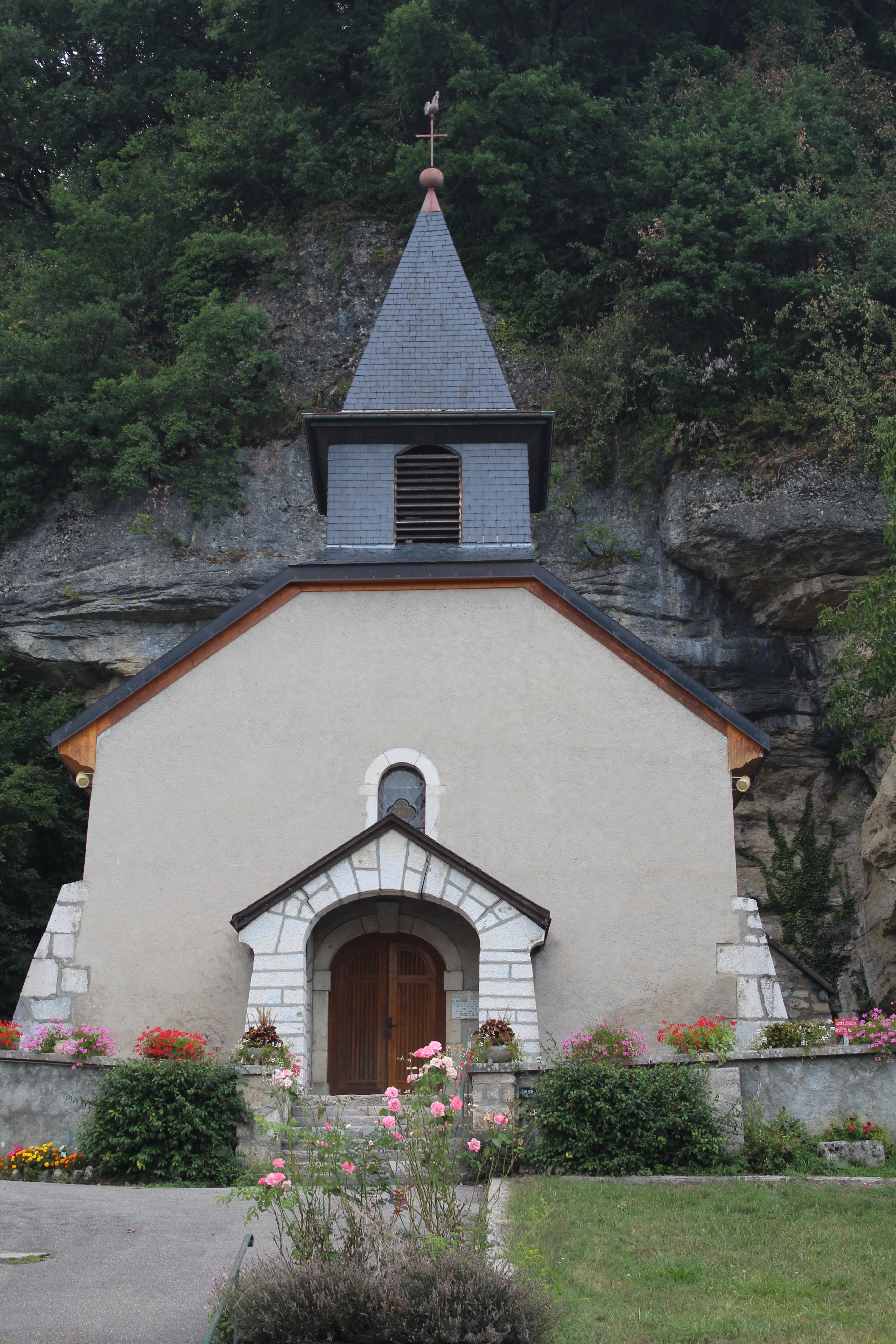 Église Saint-Germain de Saint-Germain-sur-Rhône.